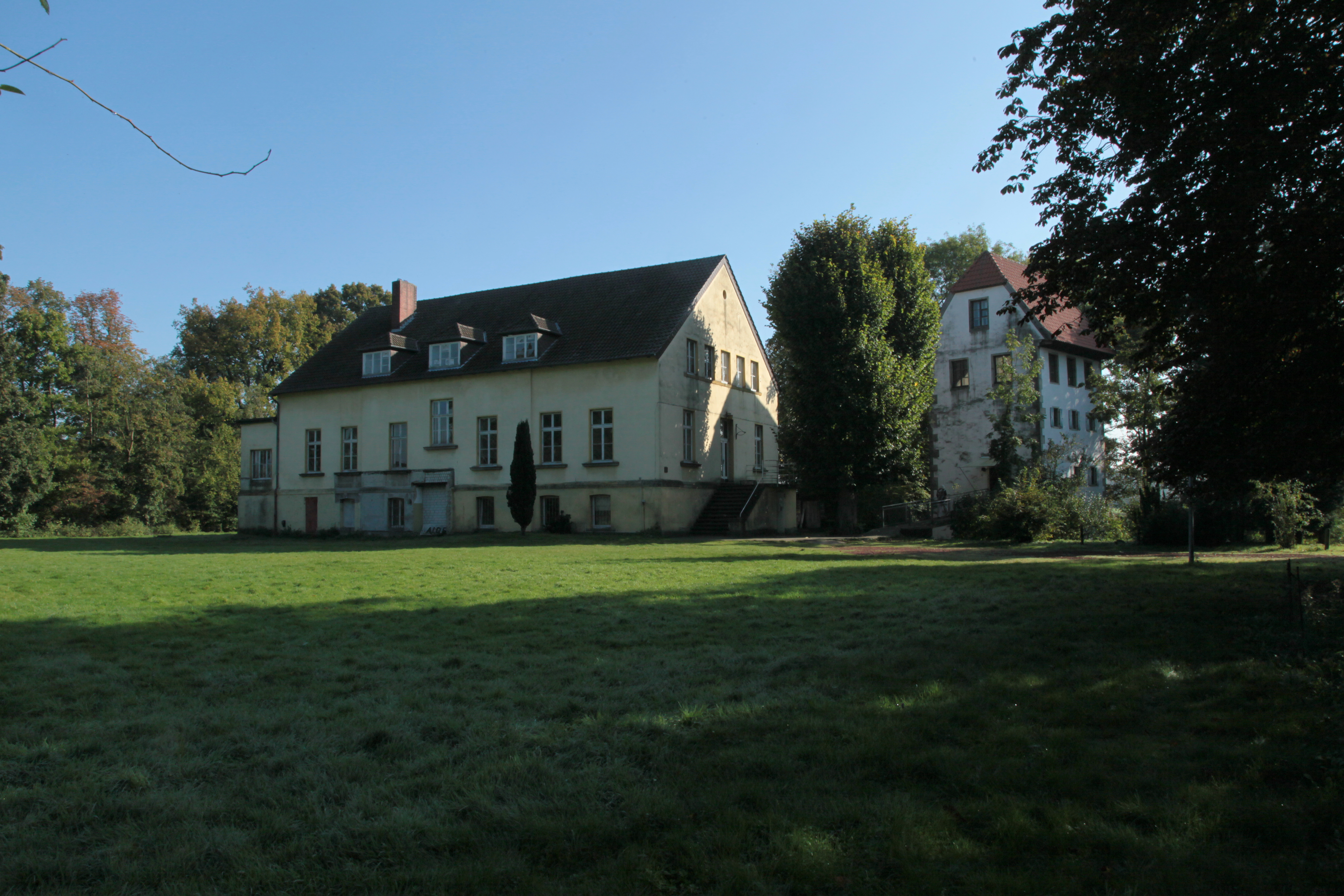 Herrenhaus und Speicher des Bispinghofs, Bispingallee in Nordwalde